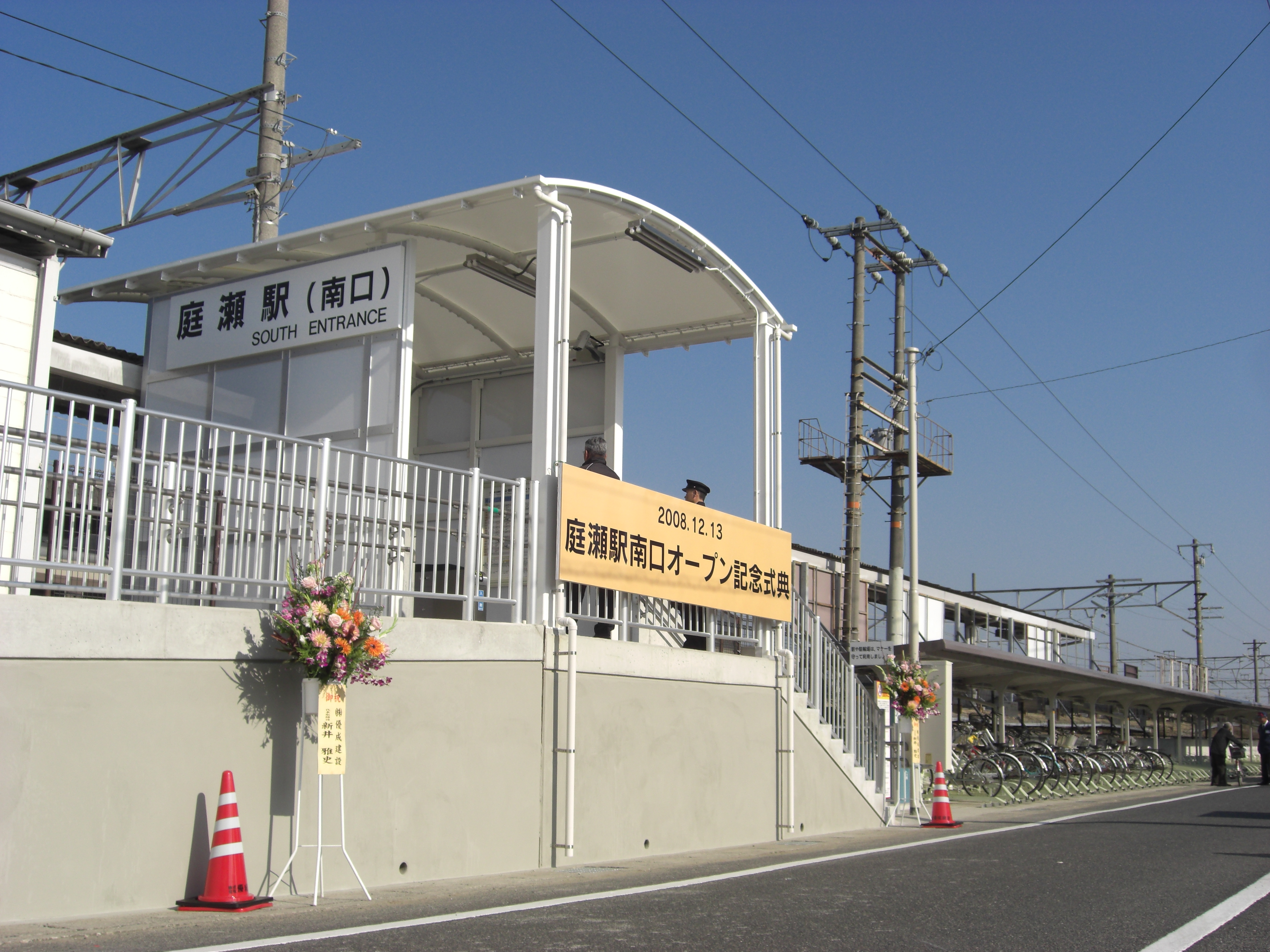 西日本旅客鉄道 山陽本線 庭瀬駅 駅ホーム